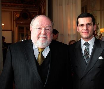 à l'Hôtel de Crillon lors de la conférence de presse pour la parution d'Alexandre Dumas et la Cité Princière